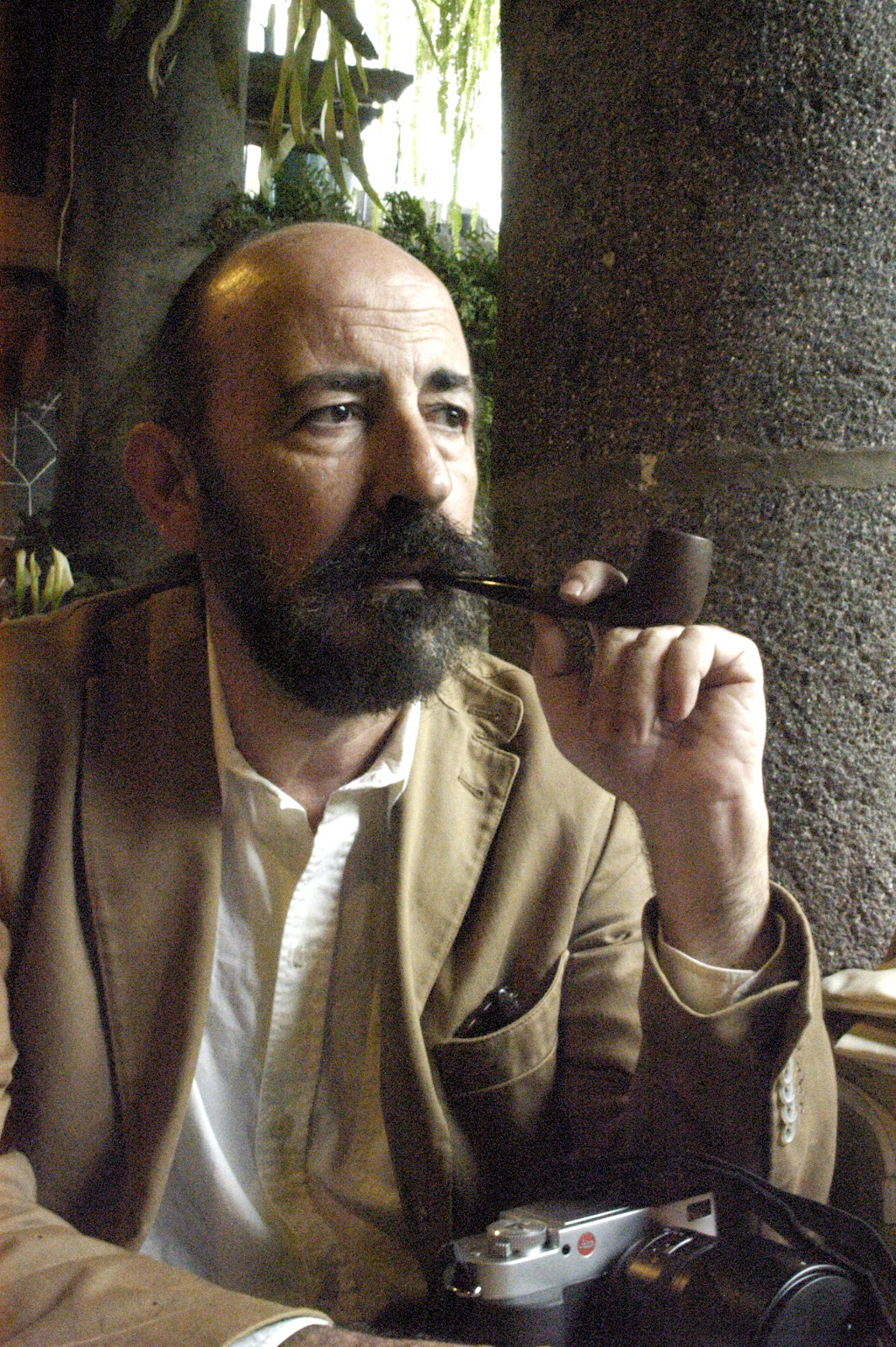 Joaquim J. Veà Baró (1958-2016), científic primatòleg.